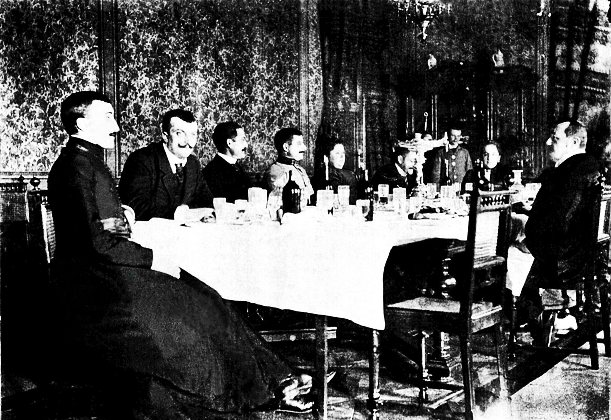 Familienfeier auf Schloss Berhometh 1904 mit Familienmitgliedern Wassilko v. Serecki und v. Ohanowicz